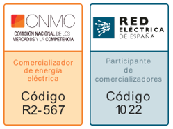 Reconocimiento de la empresa Gana Energía